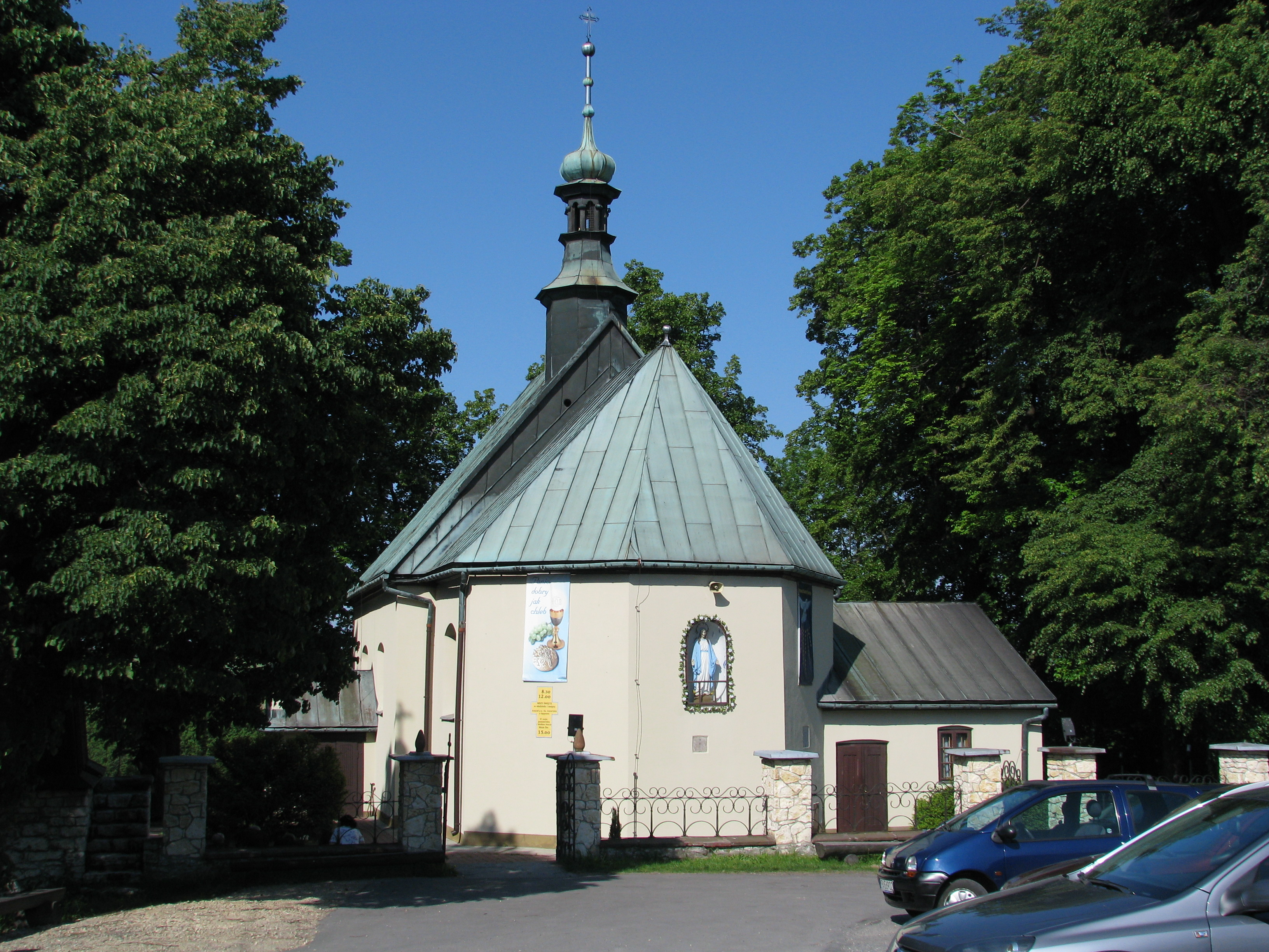 Kościół par. p.w. św. Katarzyny, 1760. Sąspów, gmina Jerzmanowice-Przeginia